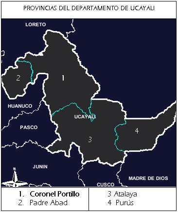 Mapa Provincias Ucayali